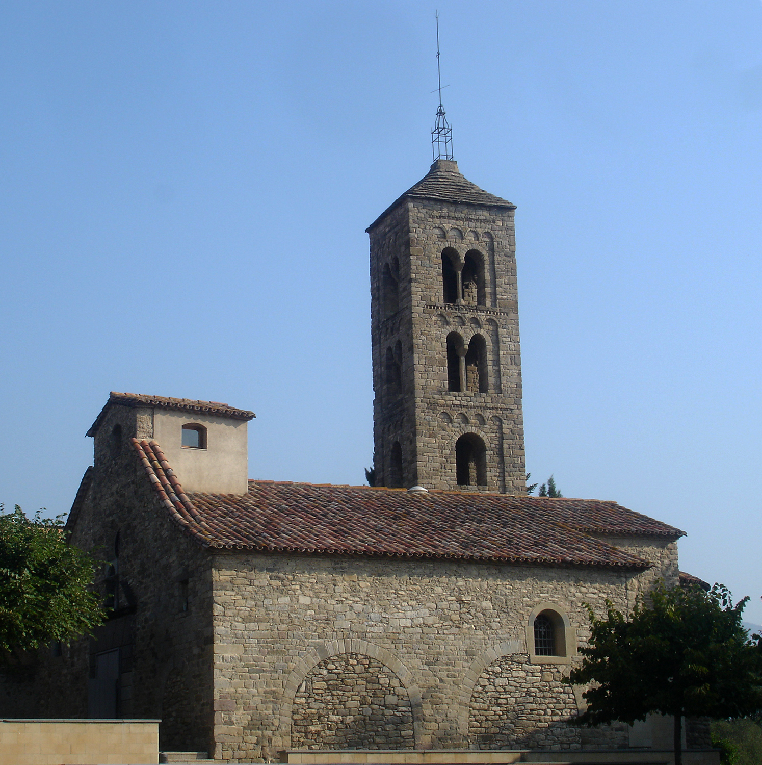 Església de Sant Vicenç de Torelló (Osona, Catalunya, Espanya)